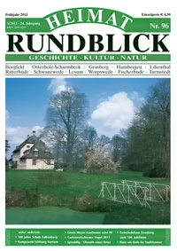 Titelseite der deutschen Regional- und Kulturzeitschrift Heimat-Rundblick (ISSN 2191-4257), 24. Jahrgang, Heft Nr. 96 (1/2011) vom 1. Quartal 2011. Das Titelfoto stammt von Wilko Jäger, Schwanewede, und zeigt das Dammgut in Ritterhude in Niedersachsen (Deutschland).)